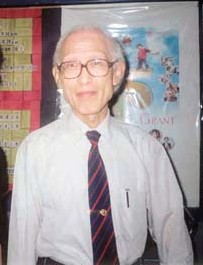 Prof. Yu Kwang Chung, Author, Taiwan 作家余光中